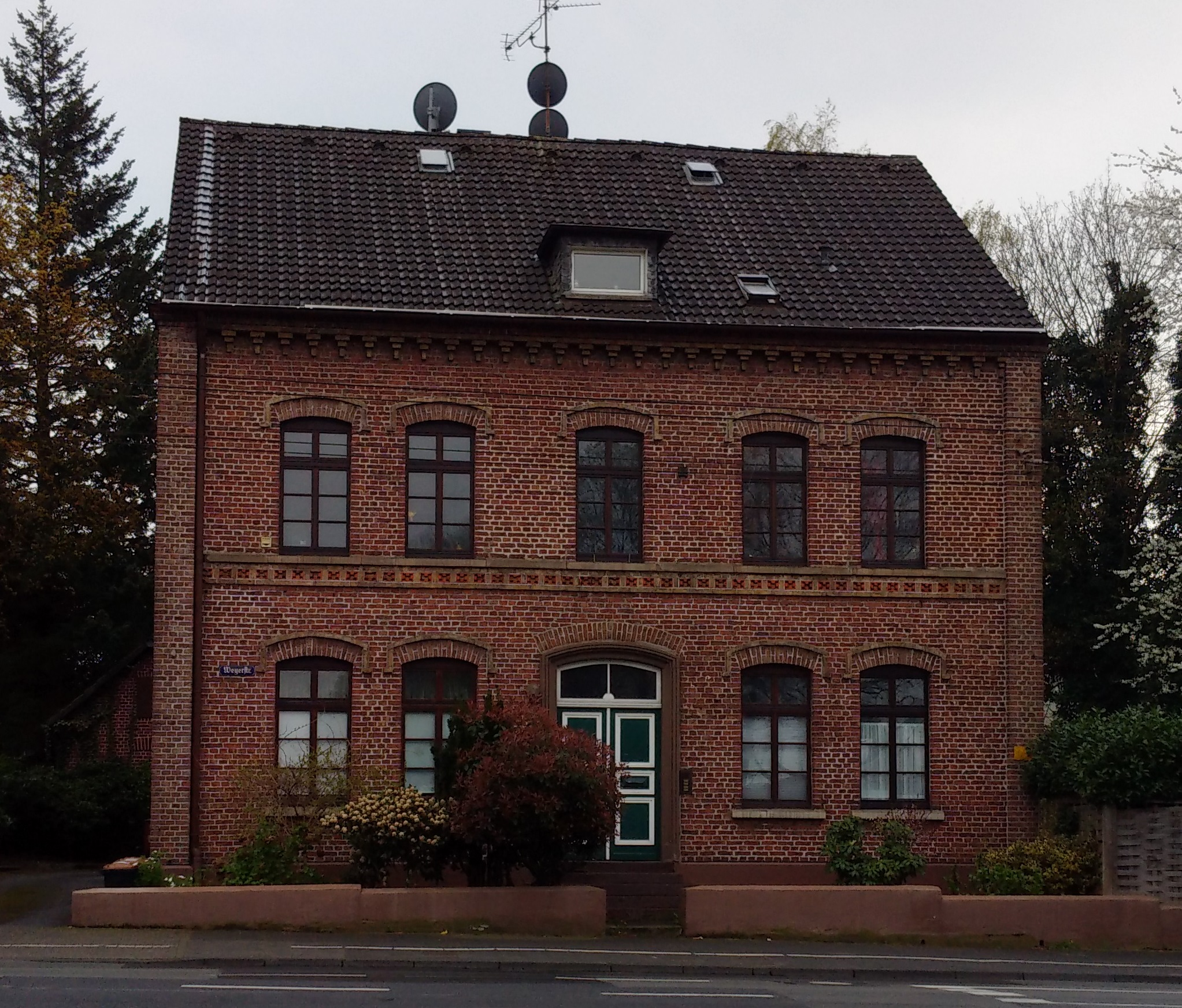 Baudenkmal ehemaliges Rathaus Merscheid Weyerstraße in Solingen, aufgenommen im Frühling 2016